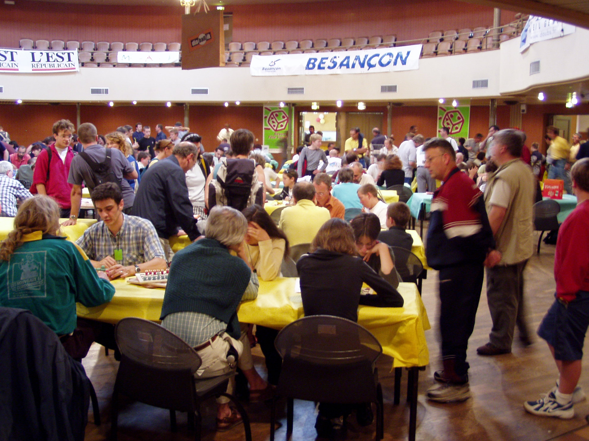 Photo du festival de Besançon 2003 FH 22 décembre 2005 à 16:00 (CET) Catégorie:Photo de jeu de société